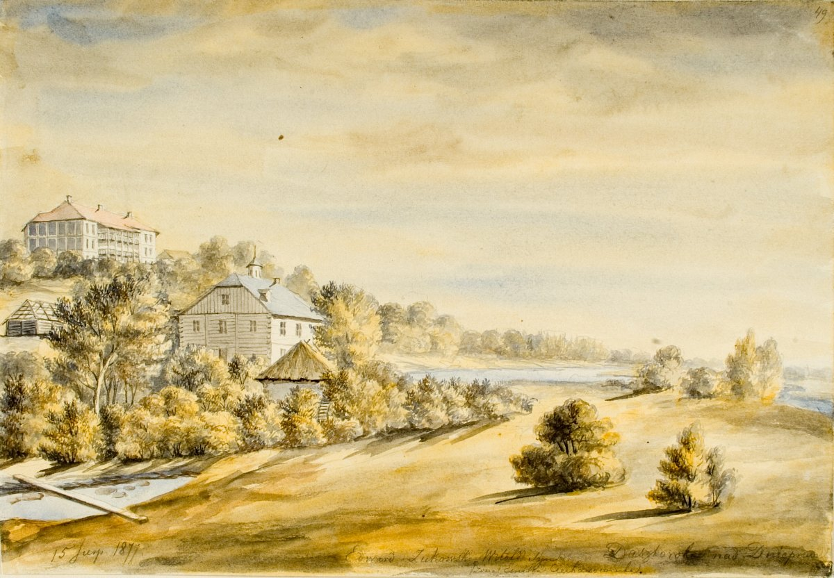 Беларуская (тарашкевіца): Дашкаўка (Daškaŭka), сядзіба Жукоўскіх (Žukoŭski)